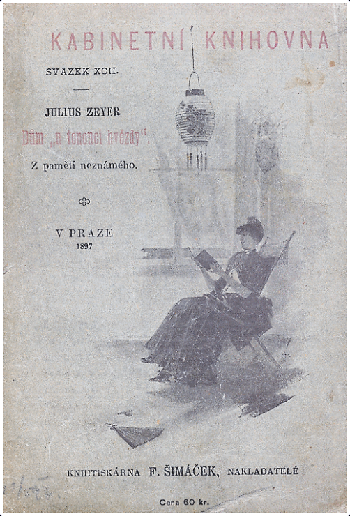 Titulní strana prvního vydání knihy Dům U tonoucí hvězdy od Julia Zeyera z roku 1897